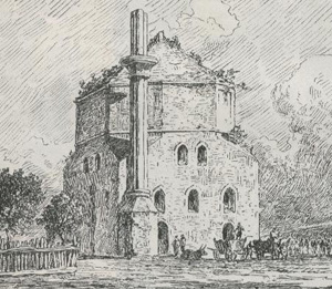 Batal Mosque remains in Belgrade (now do not exist).